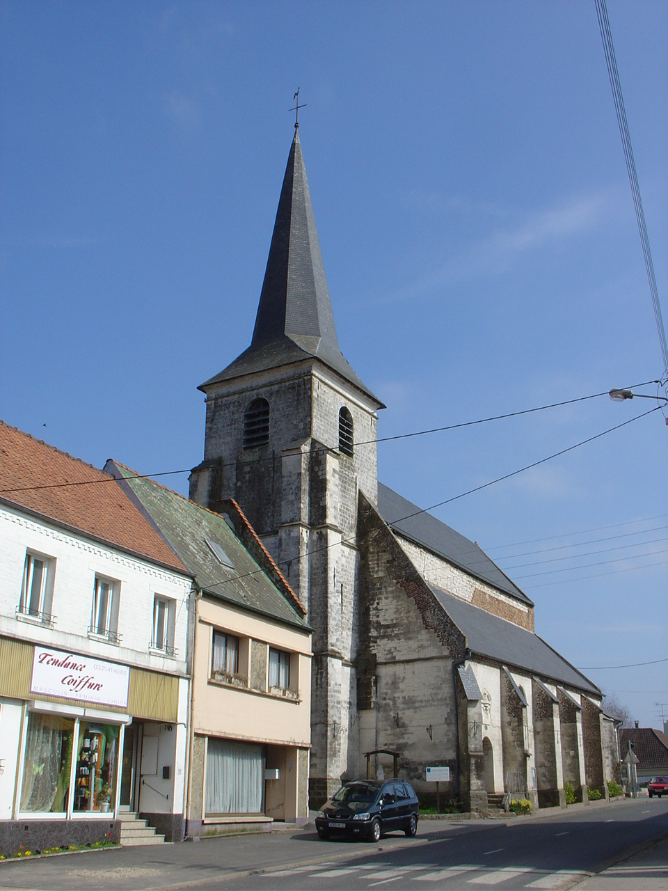 Église de Blangy-sur-Ternoise